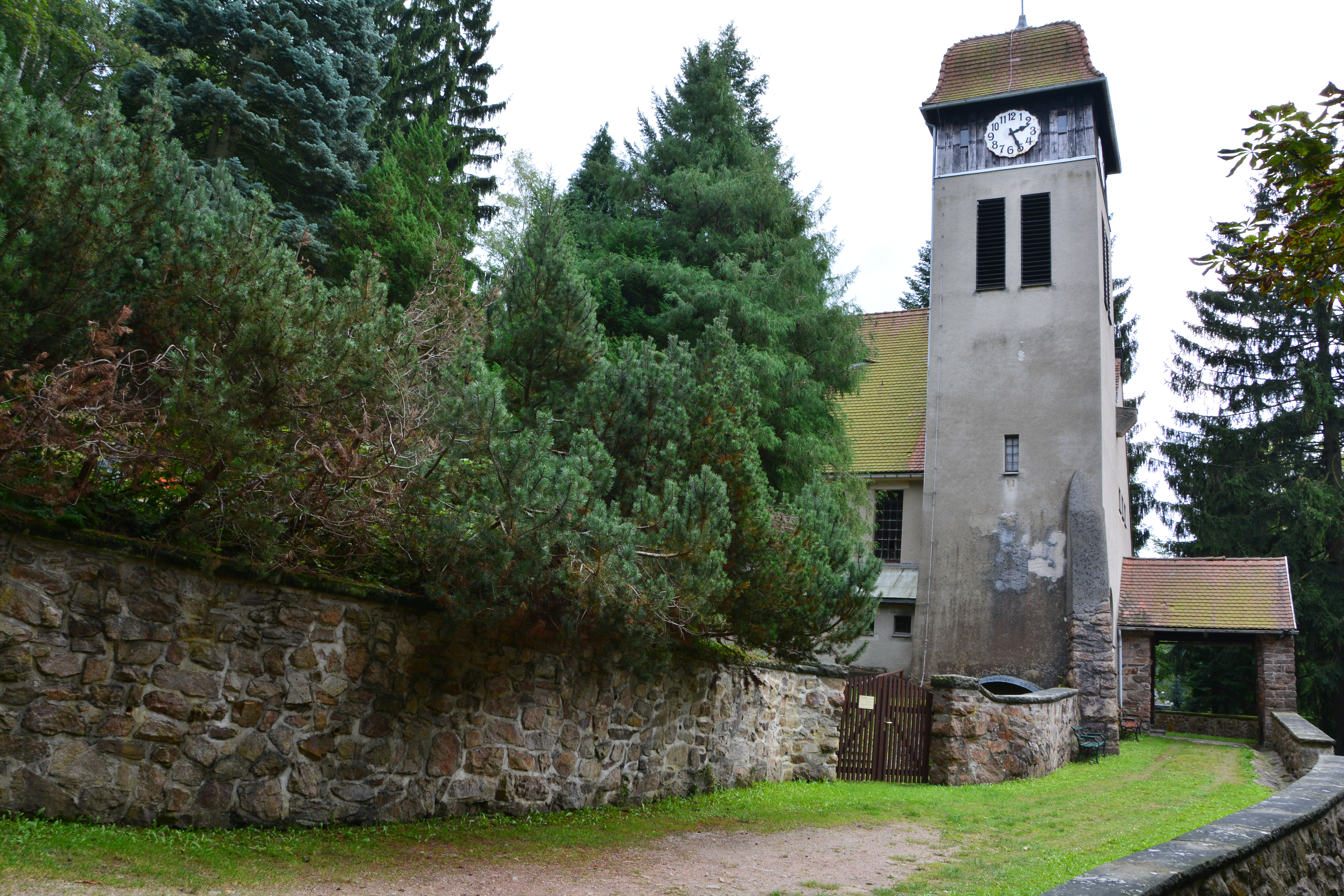 Bergkirche Kurort Kipsdorf, nach einen Entwurf von William Lossow und Max Hans Kühne 1908 erbaut. In den Jahren 1956 und 1988 wurde die Kirche restauriert .